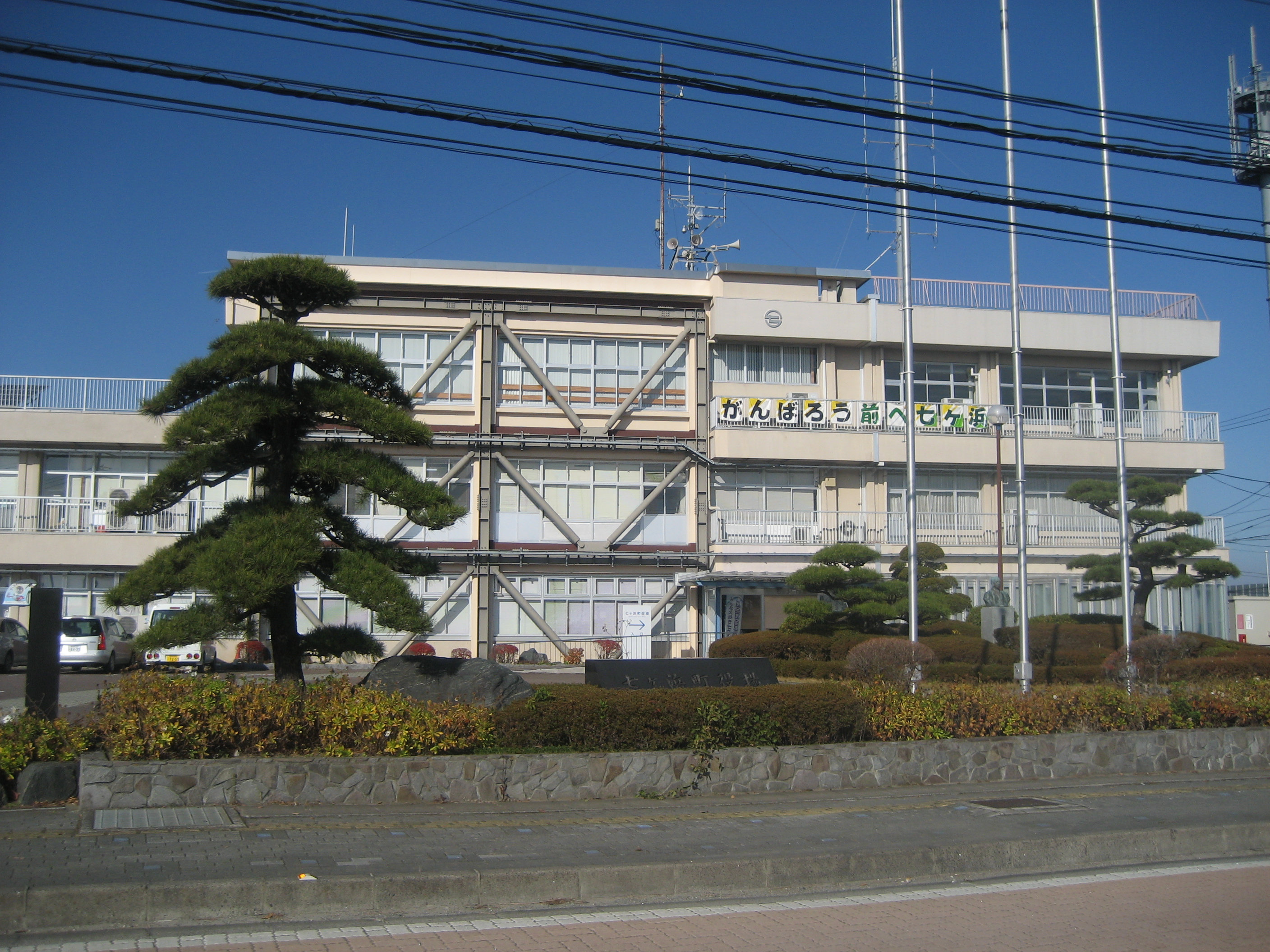 宮城県にある七ヶ浜町役場庁舎